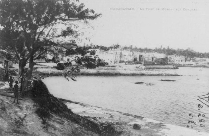 Madagascar : le port de Moroni aux Comores.